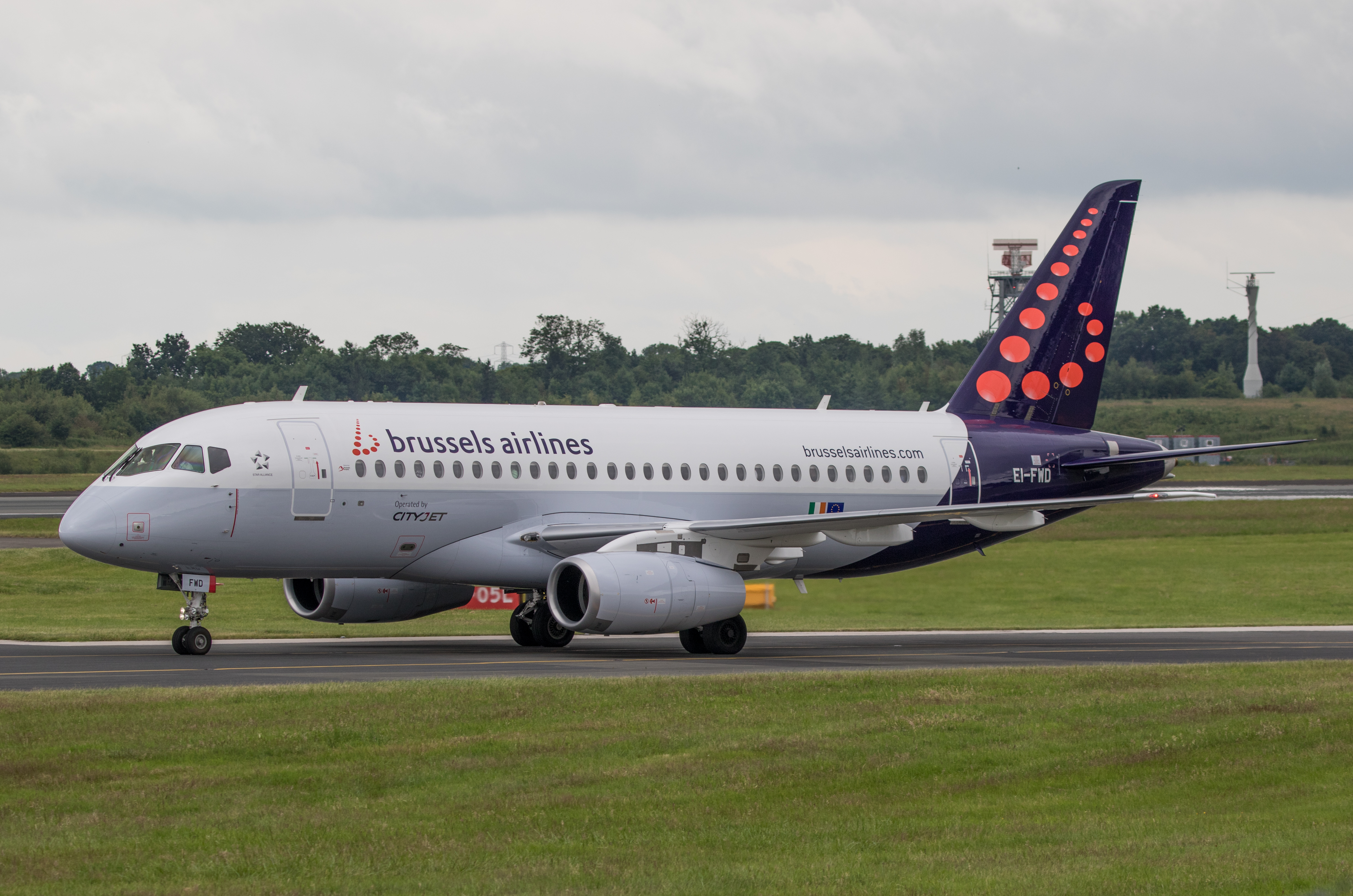 Brussels Airlines Sukhoi Superjet